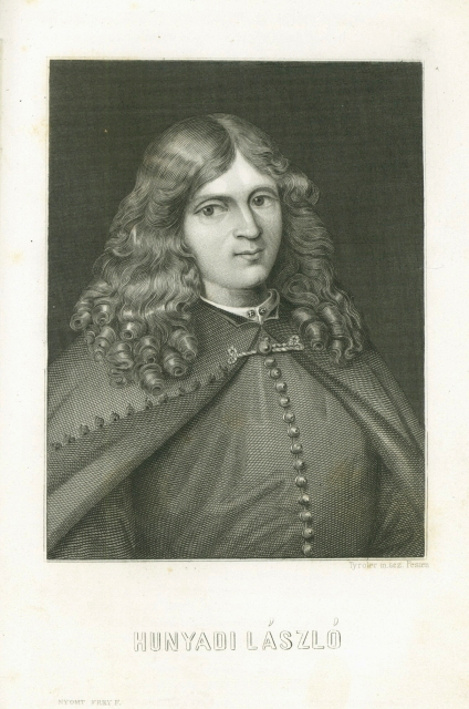 Hunyadi László (1433 - 1457). Metszet Teleki József: Hunyadiak kora Magyarországon 2. kötetéből. Pest, 1852.